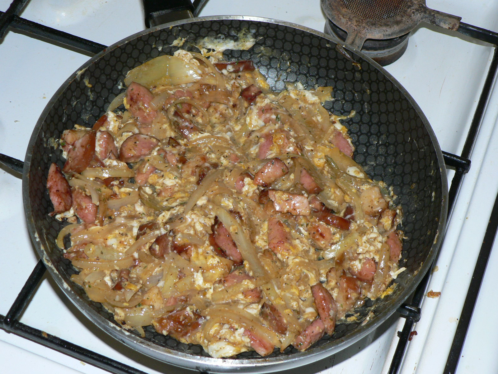 Domowa jajecznica z cebulą i kiełbasą. Беларуская (тарашкевіца): Хатняя яечня з цыбуляй ды каўбасой.